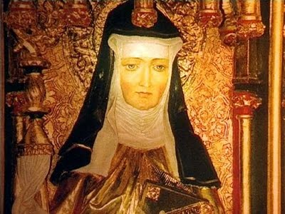 Ildegarda di Bingen - stampa antica (di presumibile pubblico dominio)